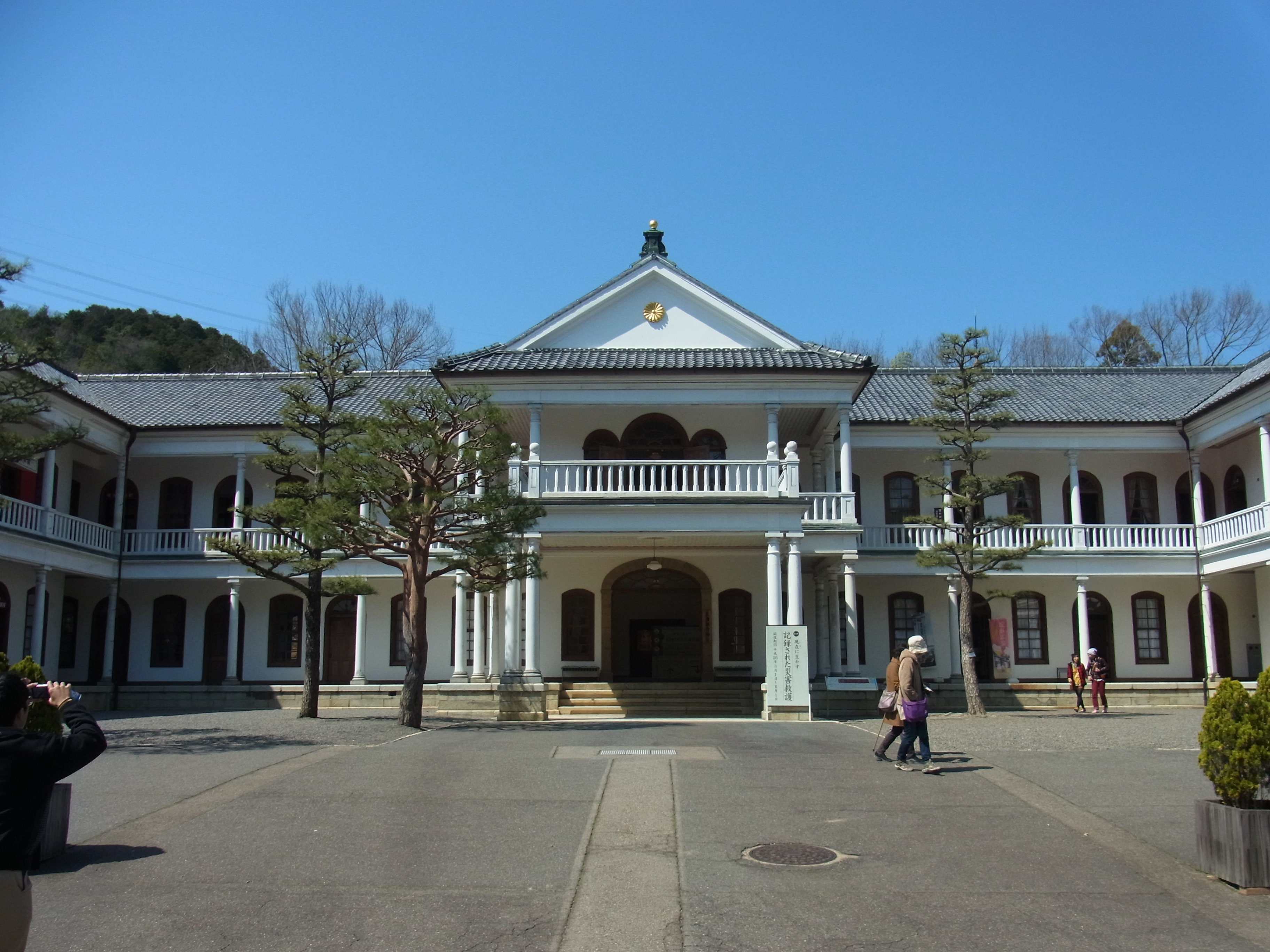 明治村、旧三重県庁舎